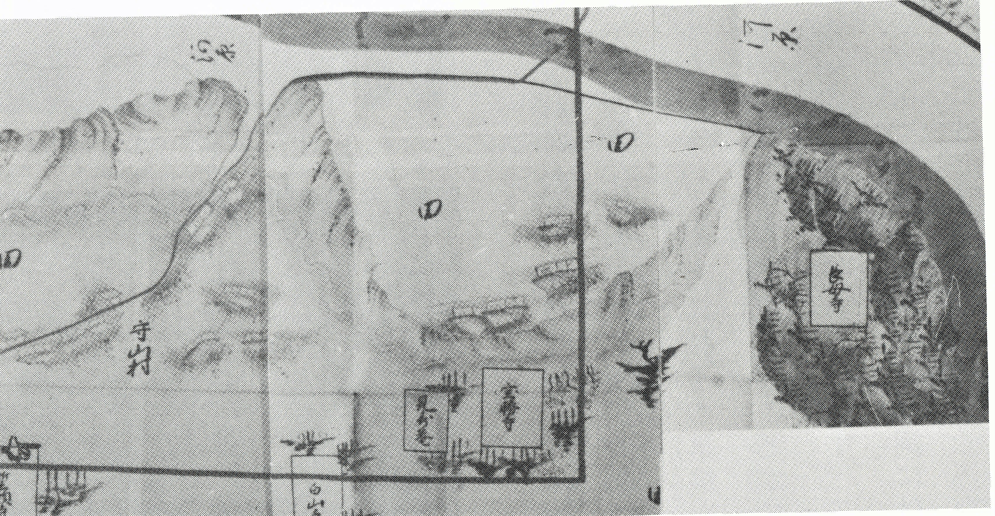 明和の洪水前は、長母寺と法勝寺が矢田川の北岸にあることが分かる資料